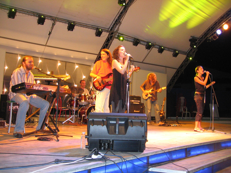 Neverne bebe - Budva 2005